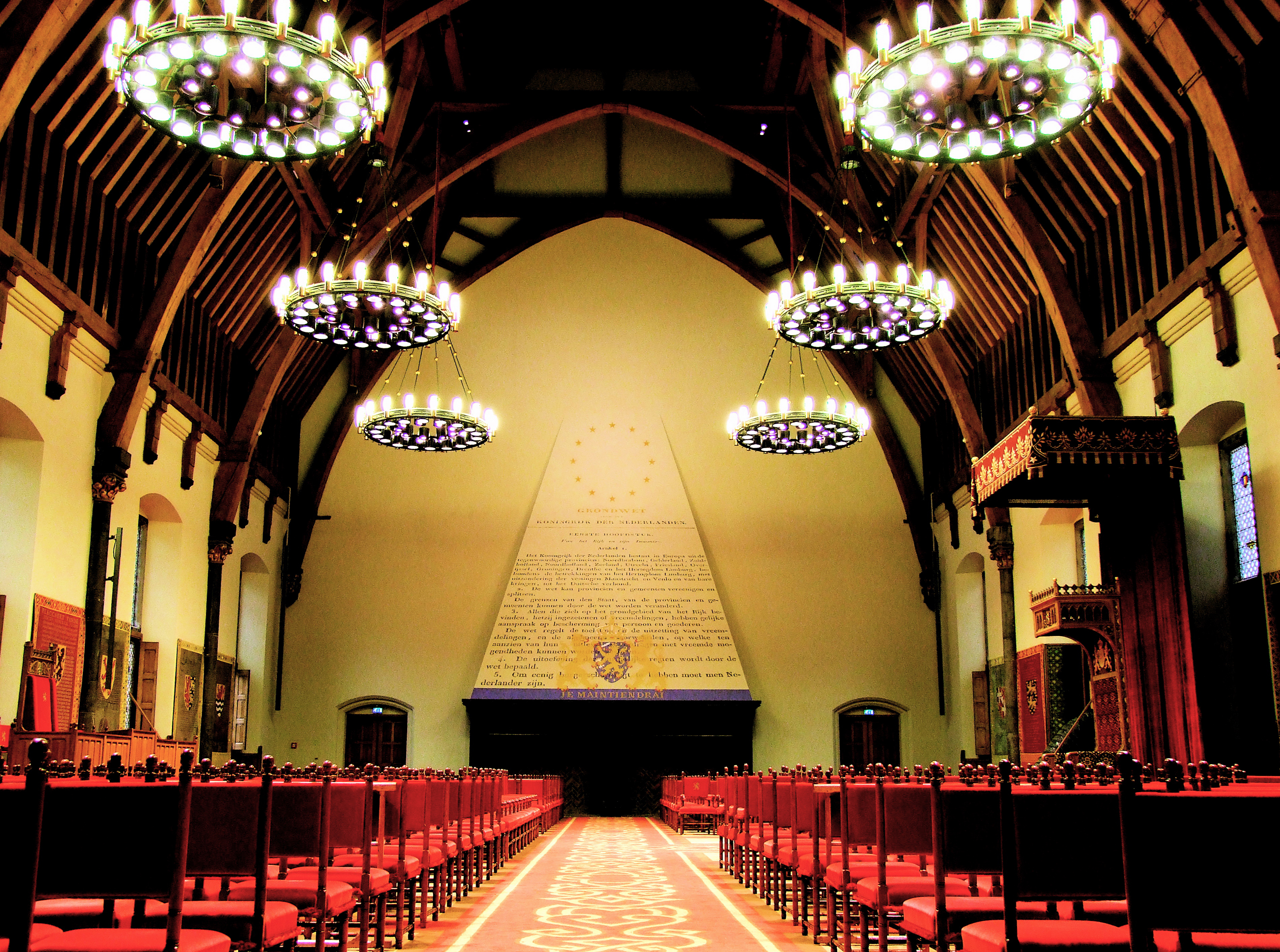 Foto van de Ridderzaal te Den Haag gemaakt tijdens Open Monumentendag op 13 september 2008